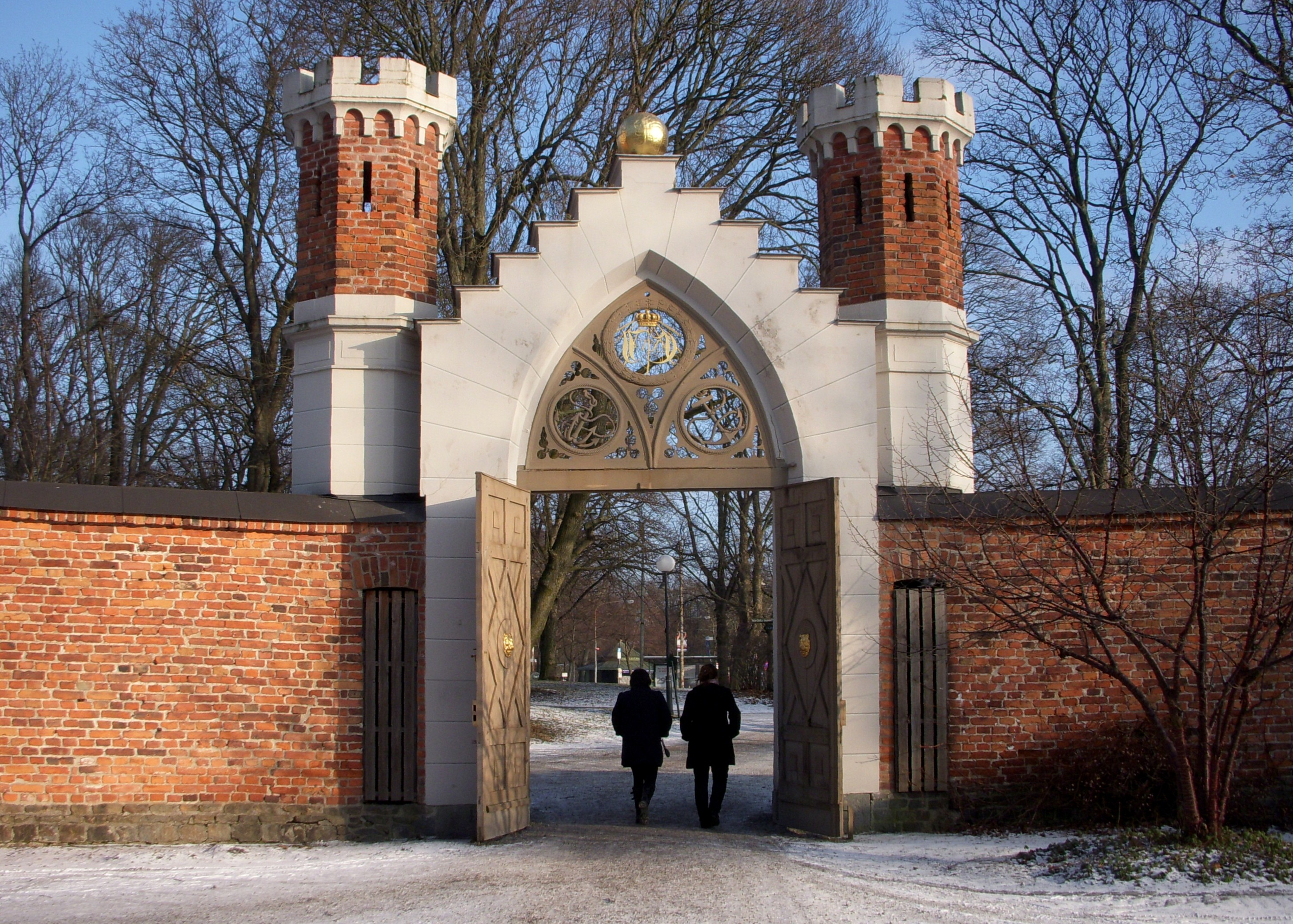 Galärvarvskyrkogården på Djurgården i Stockholm